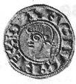 Dinero de Sancho Ramírez de Aragón (anverso) acuñado entre 1085 y 1094. Primera acuñación monetaria de un reino cristiano de la Península Ibérica. Figura la cabeza de Sancho Ramírez rodeada de la leyenda SANCIVS.REX.